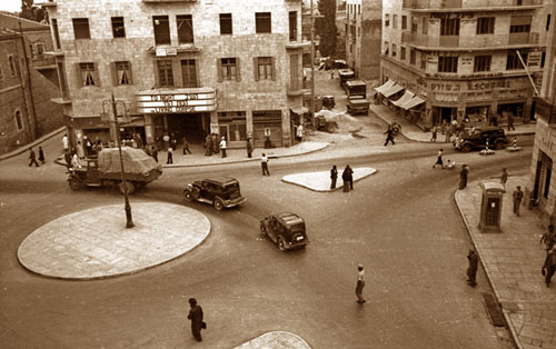 כיכר ציון בשנת 1936